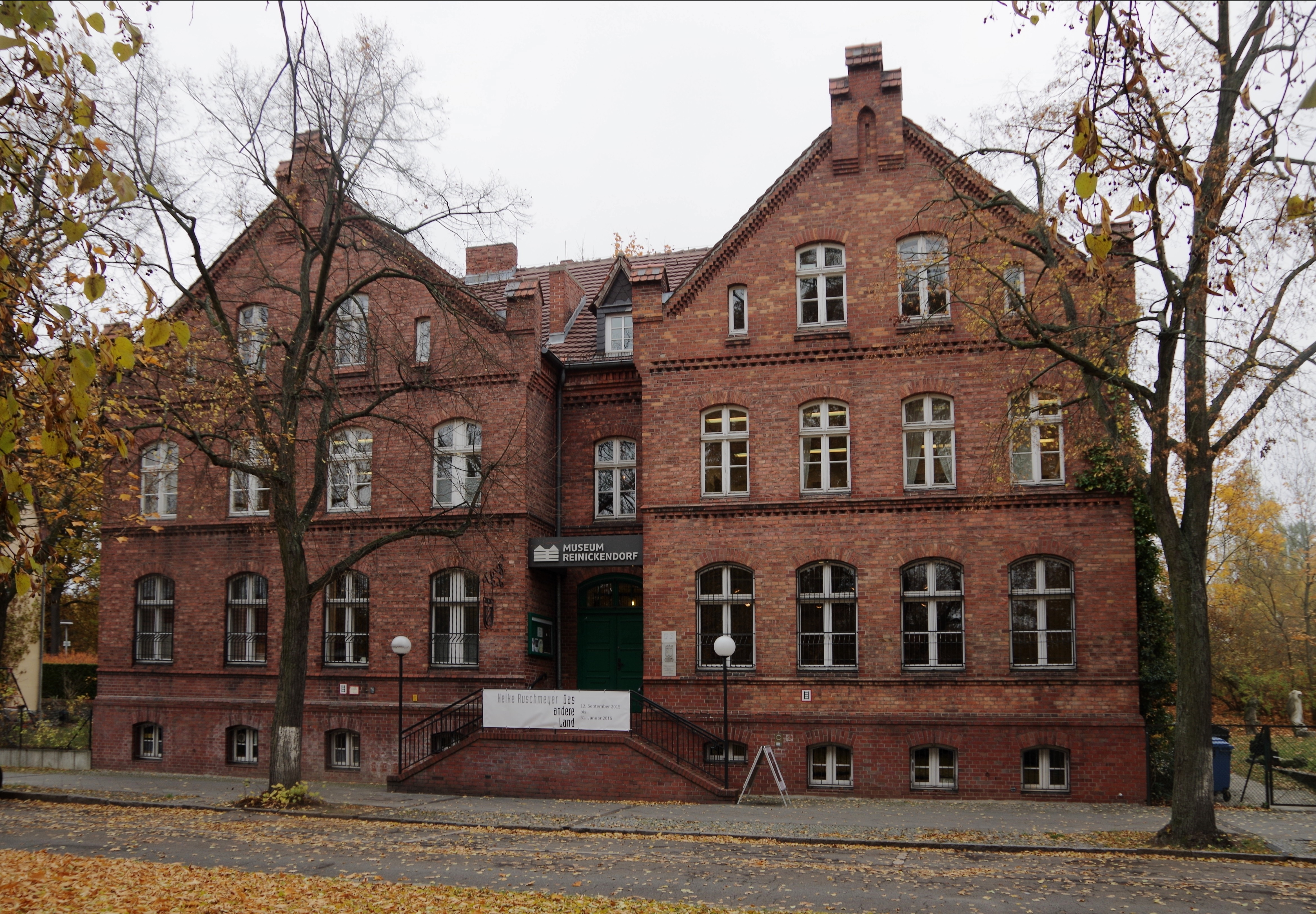 Alt-Hermsdorf 35, Gemeindeschule Hermsdorf, Heimatmuseum This is a photograph of an architectural monument.